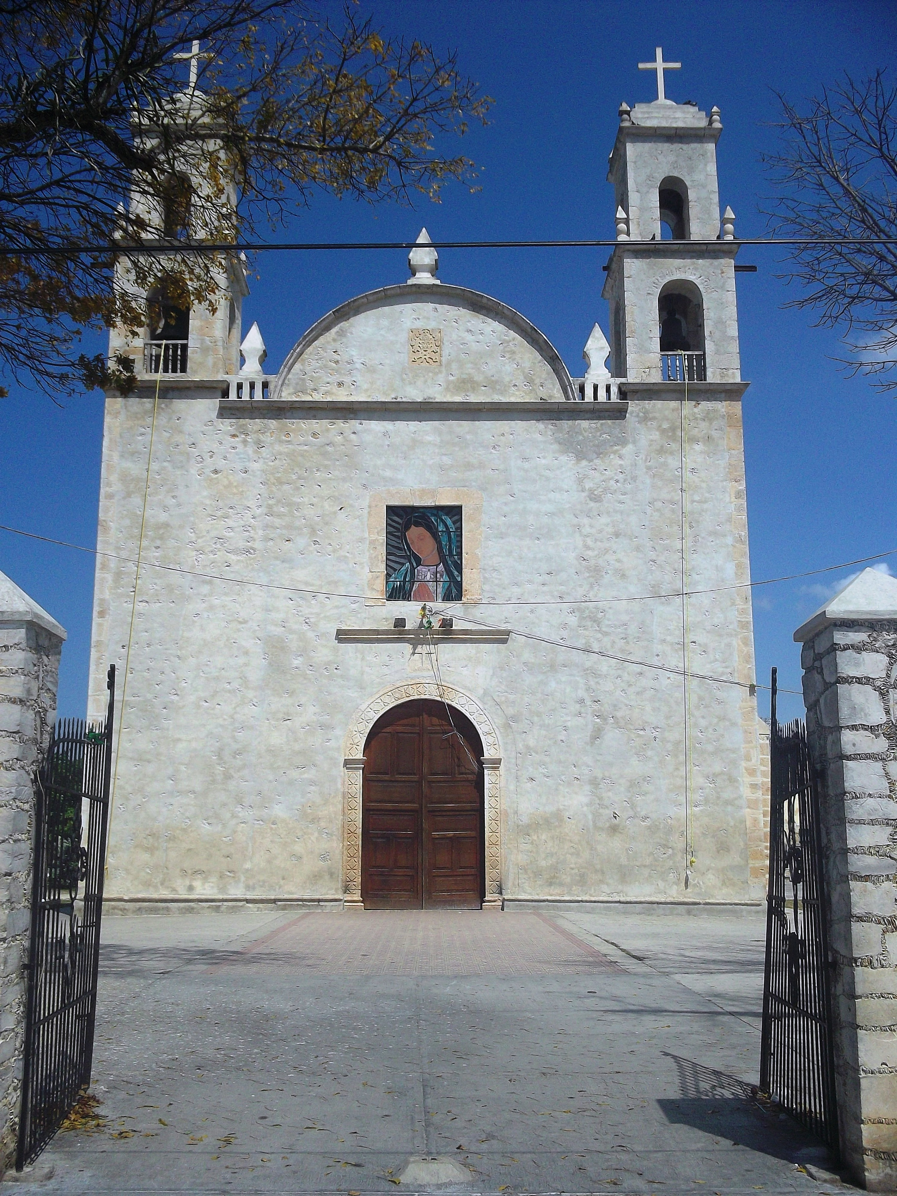 Iglesia de Tixkokob, Yucatán.